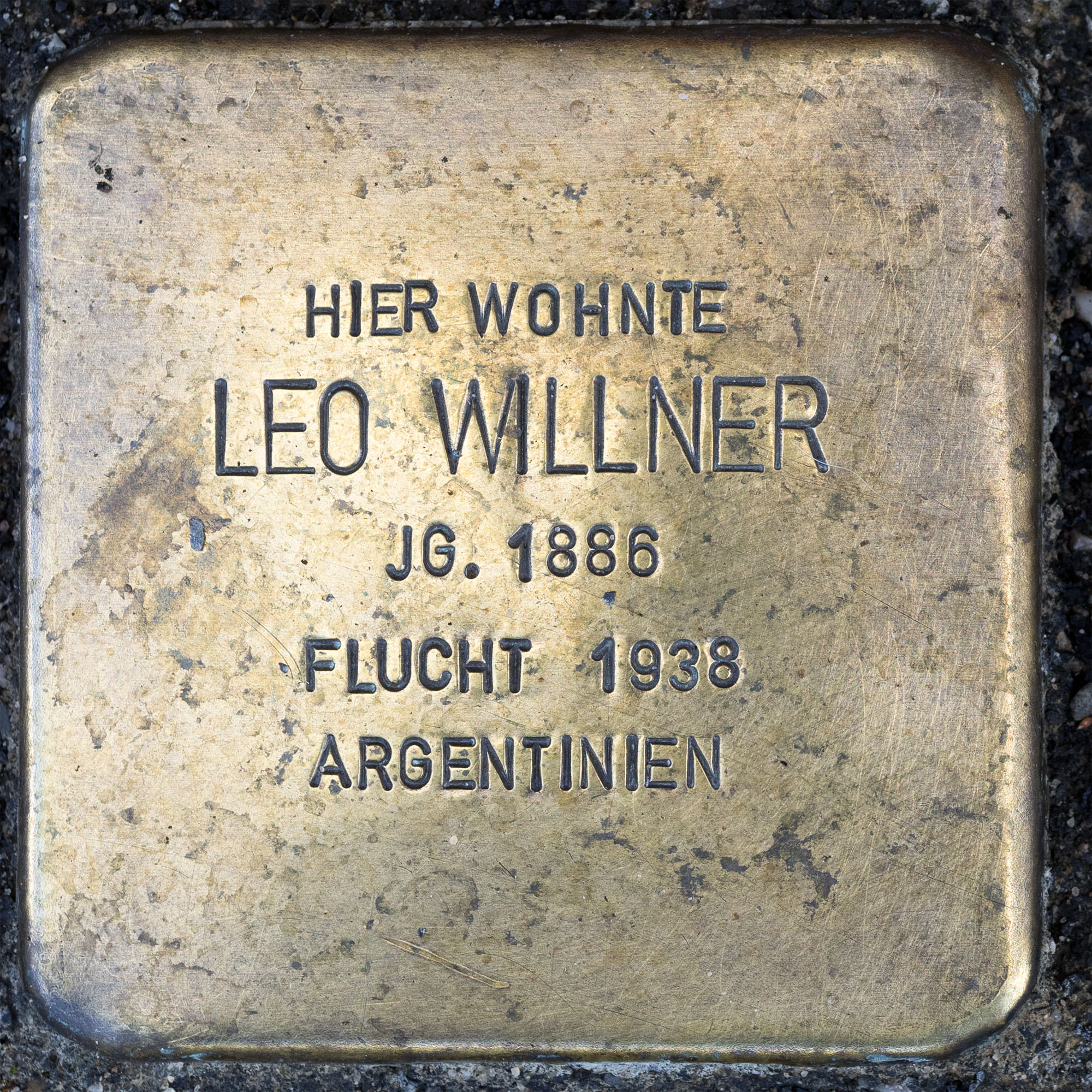 2016 Stolpersteine ToeVo Willner Leo